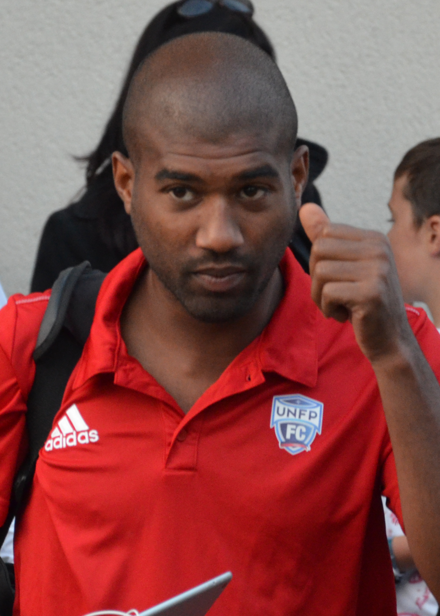 Photographie prise lors du match opposant le SM Caen à l'UNFP en match amical au stade Louis-Villemer de Saint-Lô le 30 juillet 2016. Ici, Jean-Alain Fanchone.